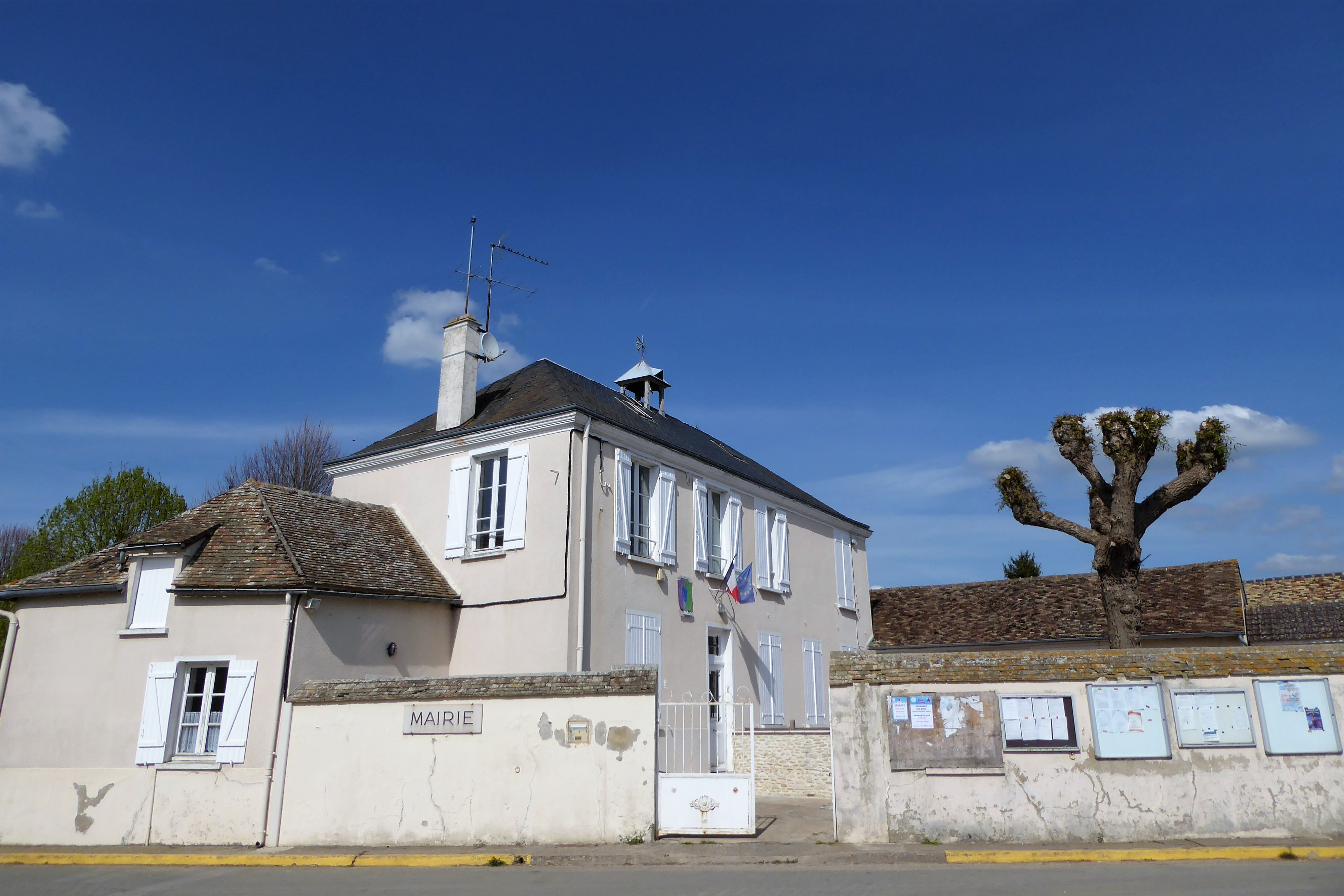 mairie à Marchefroy, Saint-Ouen-Marchefroy, Eure-et-Loir, France.